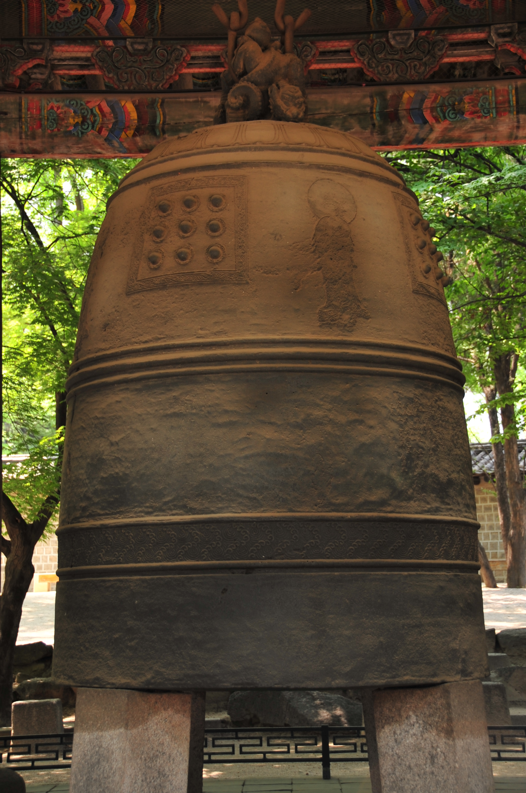 Own work 광명문 내에 전시된 흥덕사종